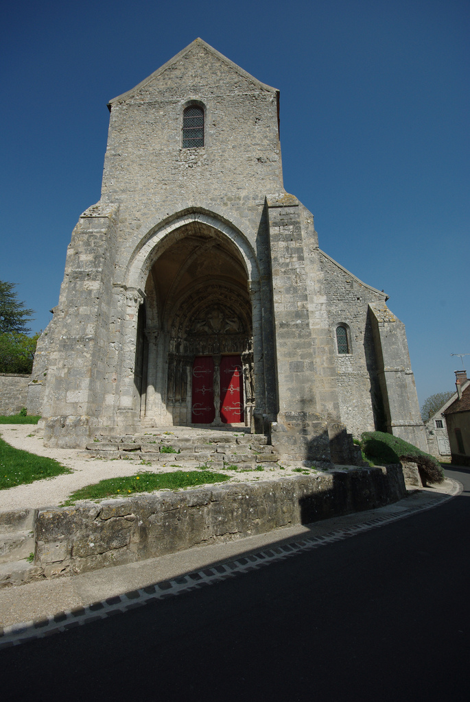 Eglise St Loup de Naud